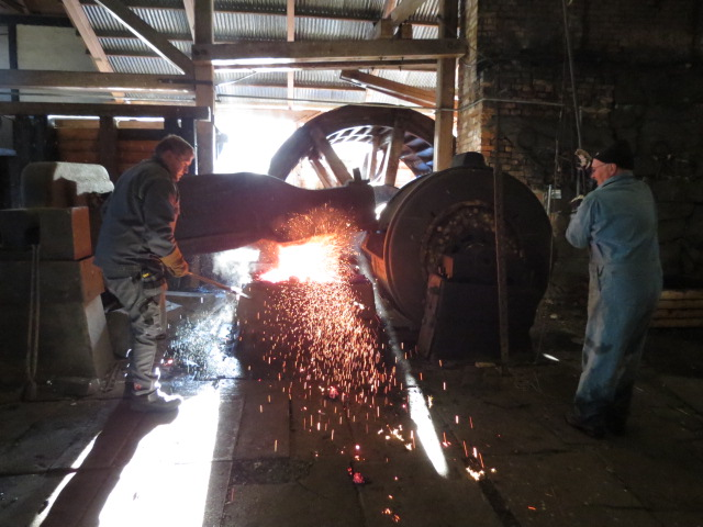 Smälta i hammaren vid lancashiresmedjan i Karmansbo. Karmansbo Bruksmiljö. Skinnskatteberg, Karmansbo